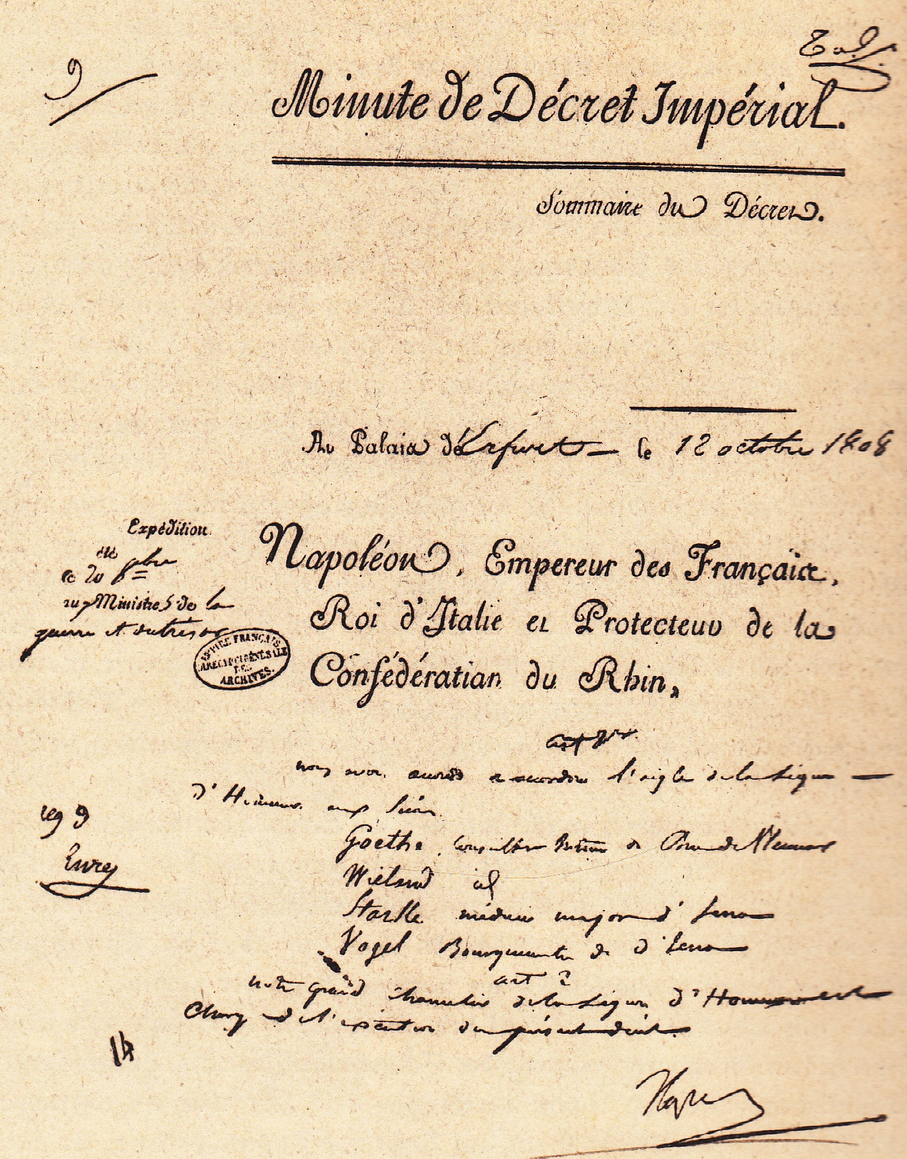 Dekret Napoleons vom 12. Oktober 1808 über die Ernennung zum Ritter der Ehrenlegion für Goethe, Wieland, Starke und Vogel; Starke: médicina major (möglicherweise Starke der Ältere); Georg Wilhelm Vogel, 1743-1813, Bürgermeister in Jena